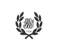 Logo der Landsmannschaft Sorabia-Westfalen